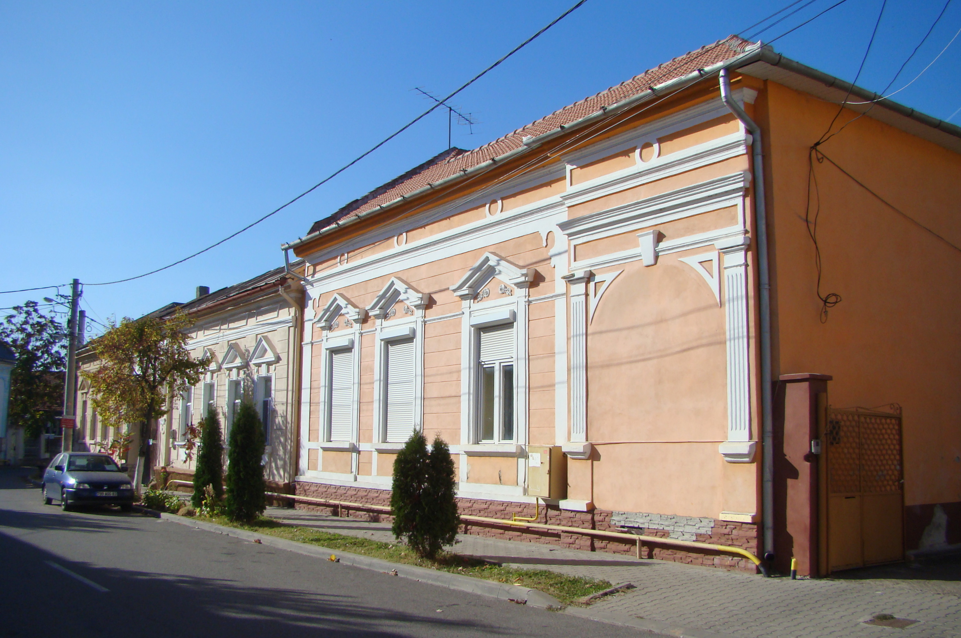 Ansamblul urban „Str. Libertății”,oraș Hațeg Str. Libertății 5-19; 6-20 sec. XIX - XX 02